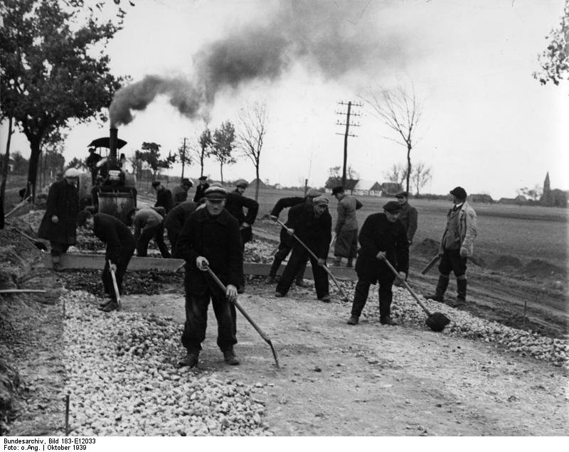 Bei Bromberg, Straßenbau Aus der Umgebung des befreiten Bromberg Überall ist man dabei die völlig verwahrlosten Chausseen auszubauen. Okt. 1939 [Polen, bei Bromberg.- Zivilisten (polnische Zwangsarbeiter?) bei der Reparatur einer Straße, im Hintergrund Straßenwalze]